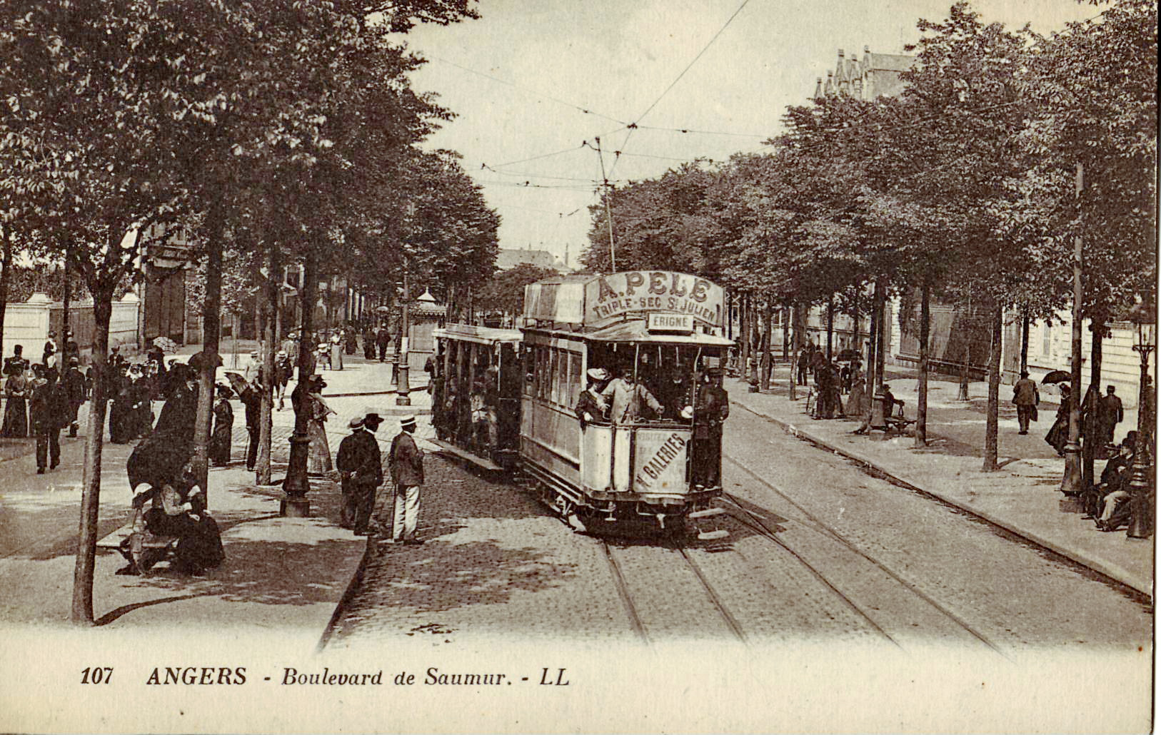 Carte postale ancienne éditée par LL, n°107 : ANGERS - Boulevard de Saumur